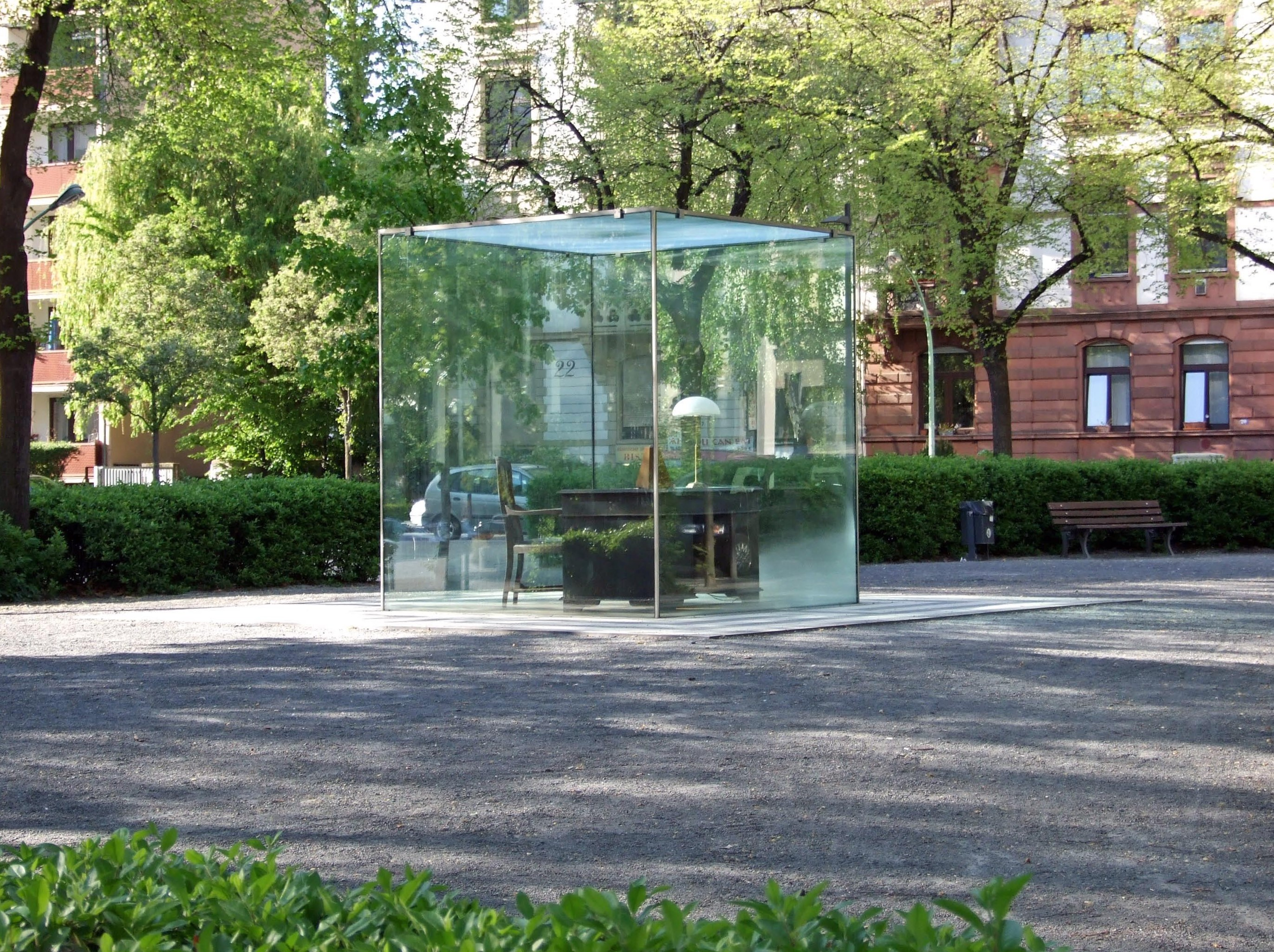 Das „Adorno-Denkmal“ auf dem „Theodor-W.-Adorno-Platz“ nur eine Parallelstraße (westlich) vom Institut für Sozialforschung entfernt.